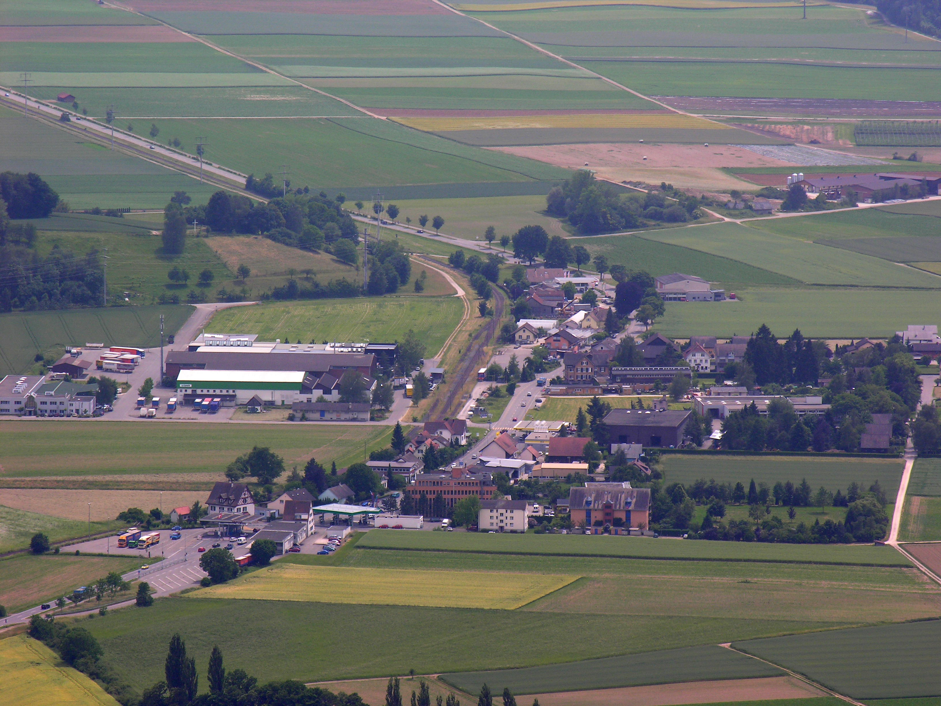 Switzerland, Canton of Schaffhausen, Ramsen Ortsteil Moskau